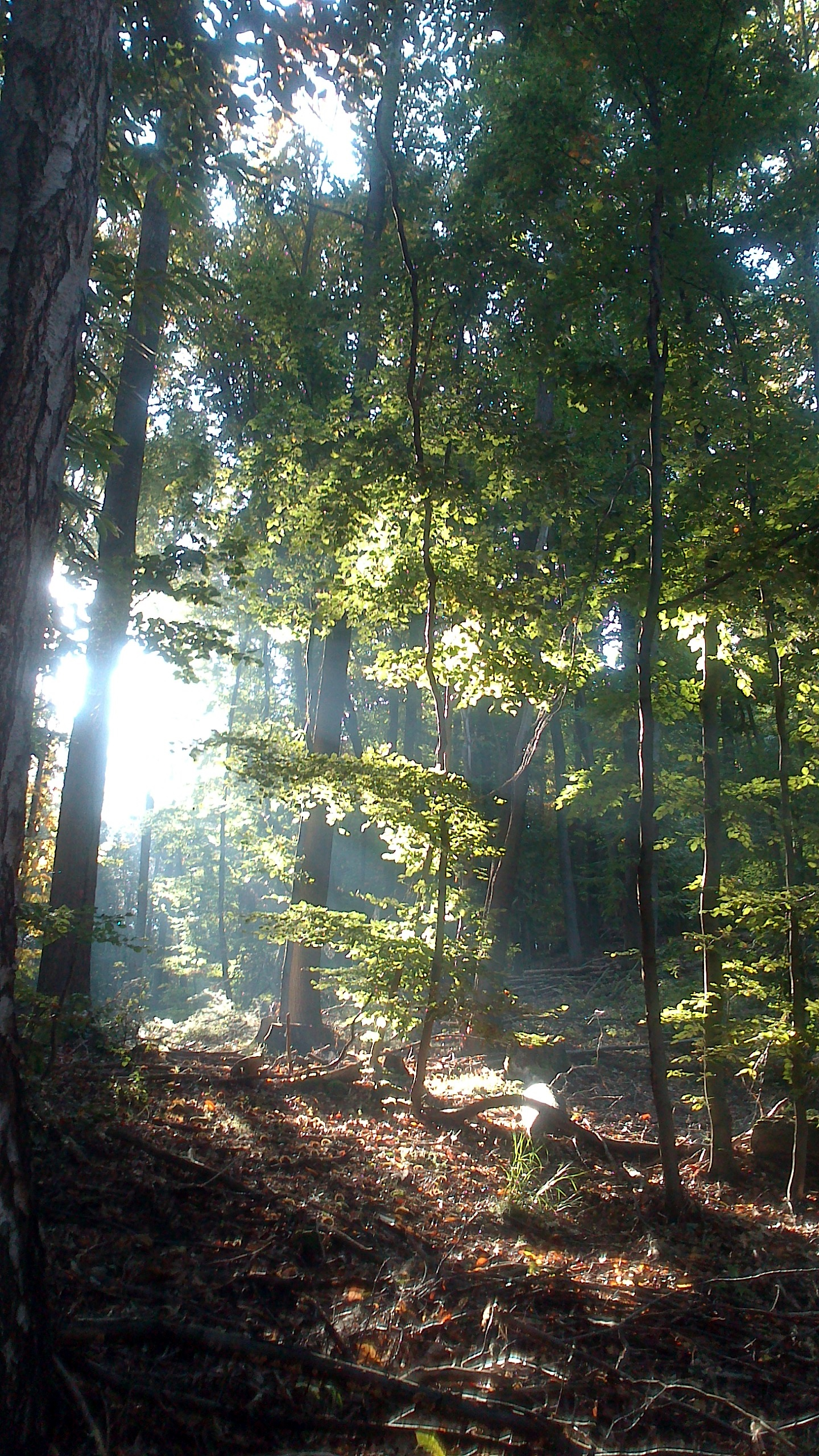 Wald im Gegenlicht, Schlagbaum, Landkreis Bad Dürkheim